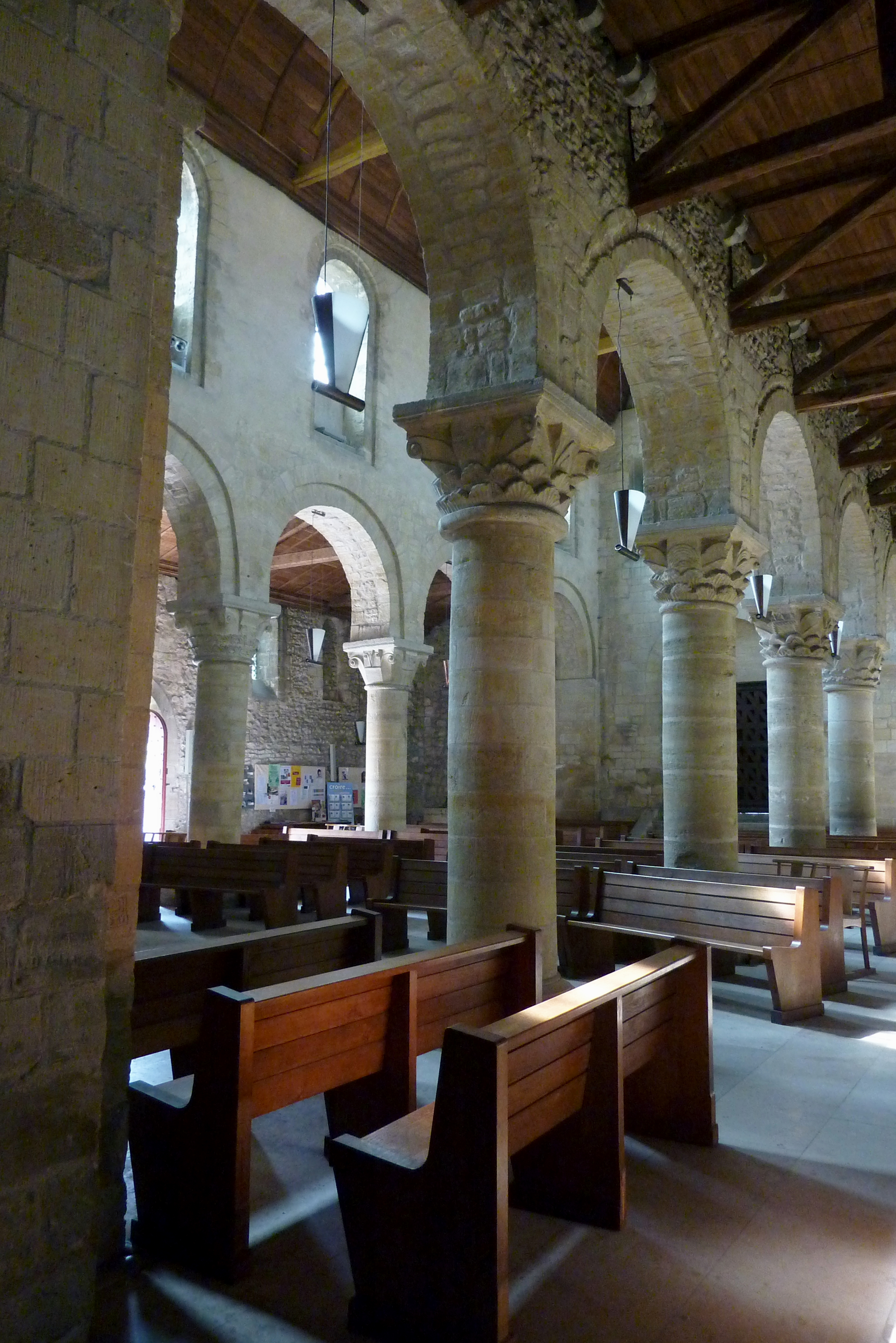 Kirche Sainte-Anne in Gassicourt, einem Stadtteil von Mantes-la-Jolie im Département Yvelines (Île de France), Langhaus